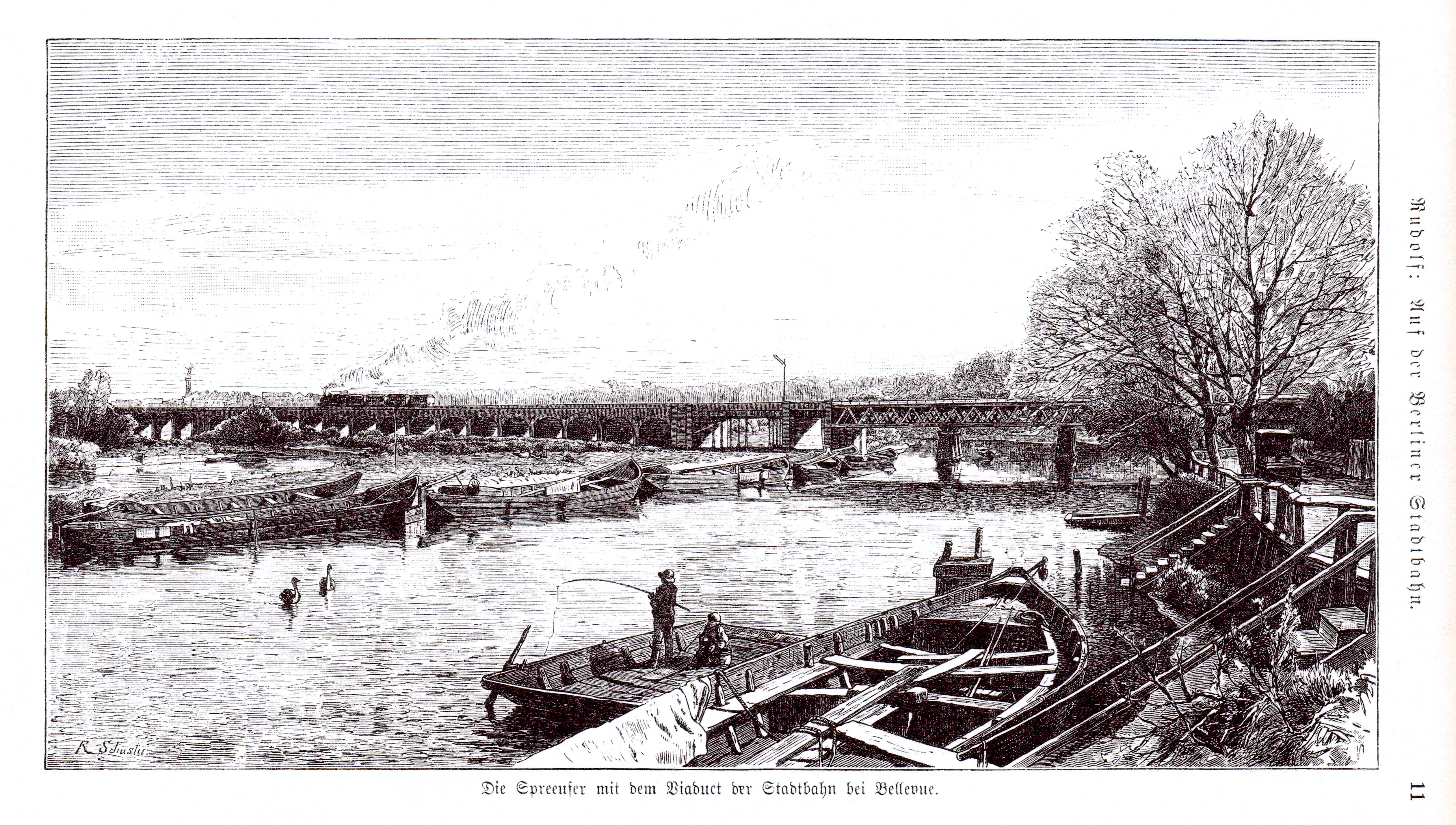 Der Holzschnitt von 1882 zeigt die neue Stadtbahn bei Bellevue.